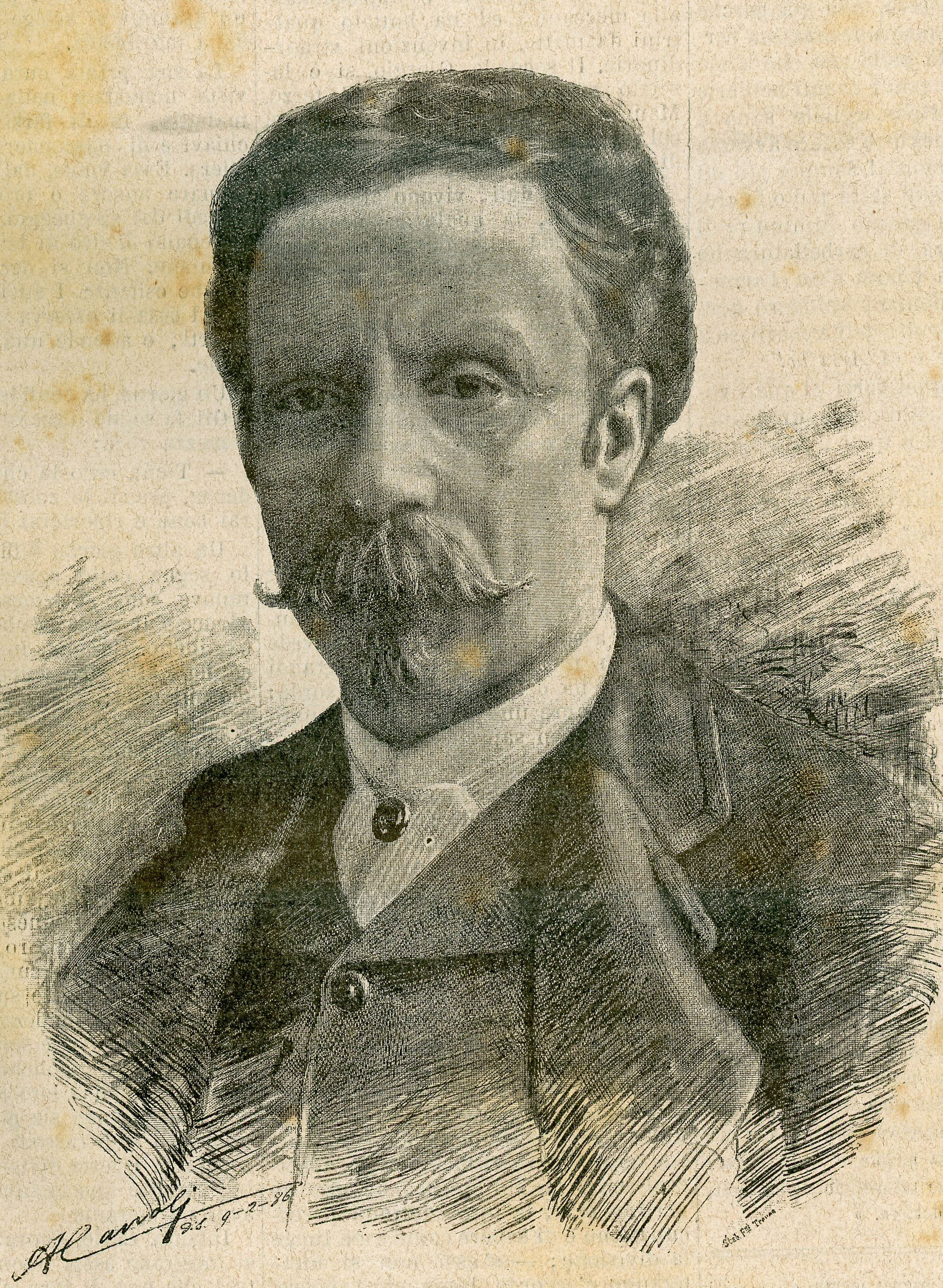 Il coreografo Luigi Manzotti, autore del ballo Amor, che si rappresenta al teatro alla Scala di Milano.